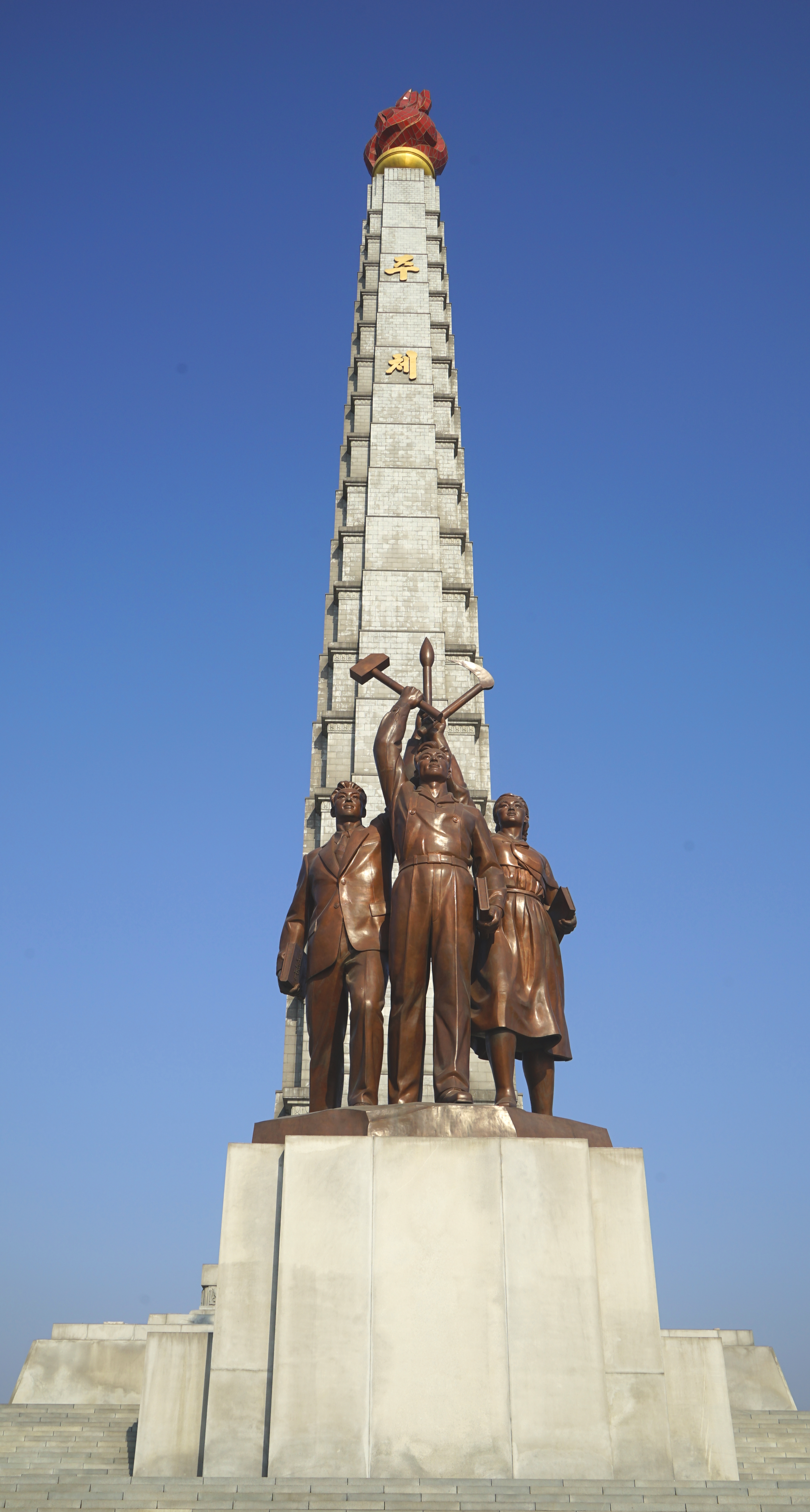 朝鮮民主主義人民共和国平壌市・主体思想塔